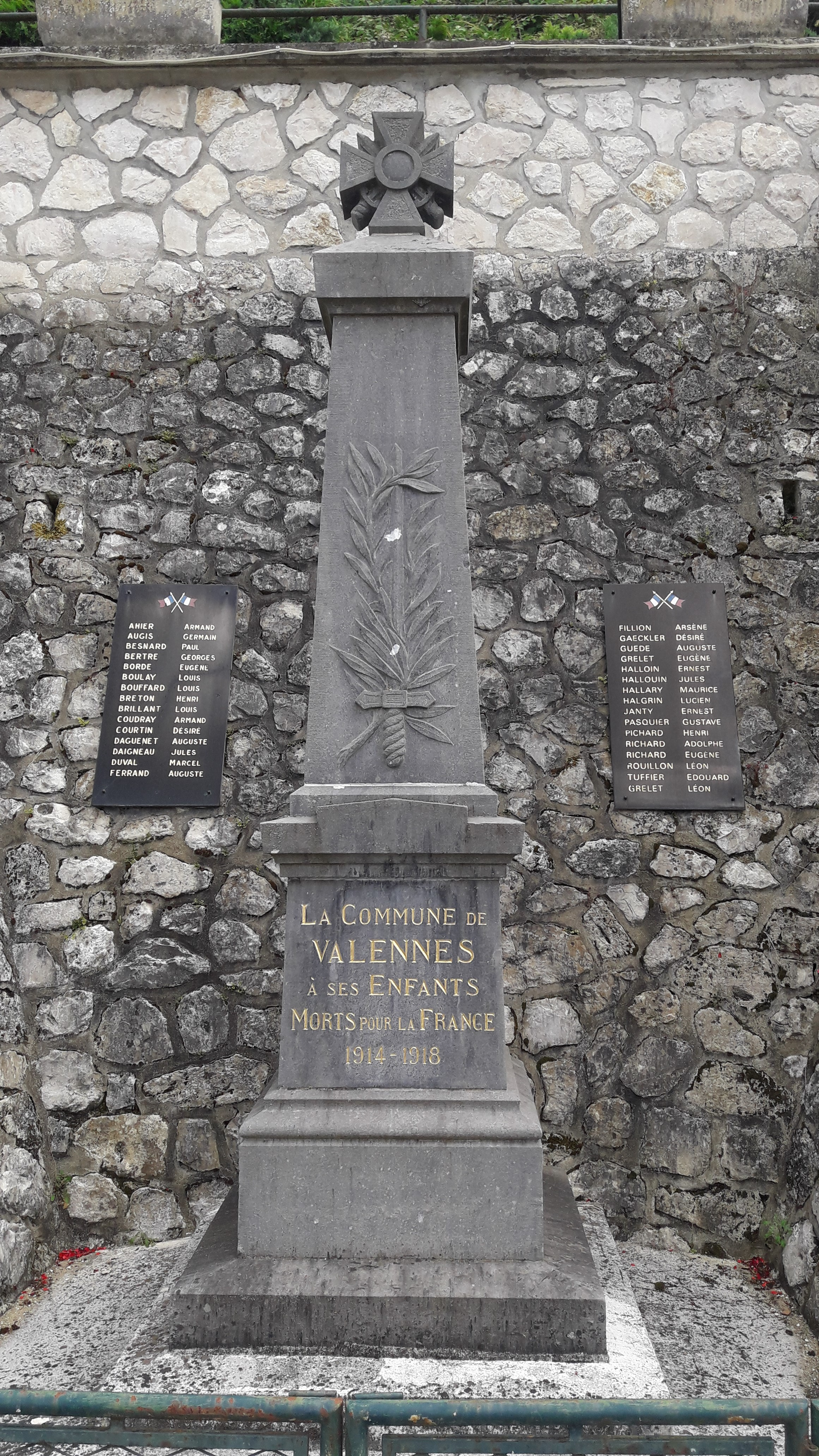 Monument commune de Valennes - Sarthe - France